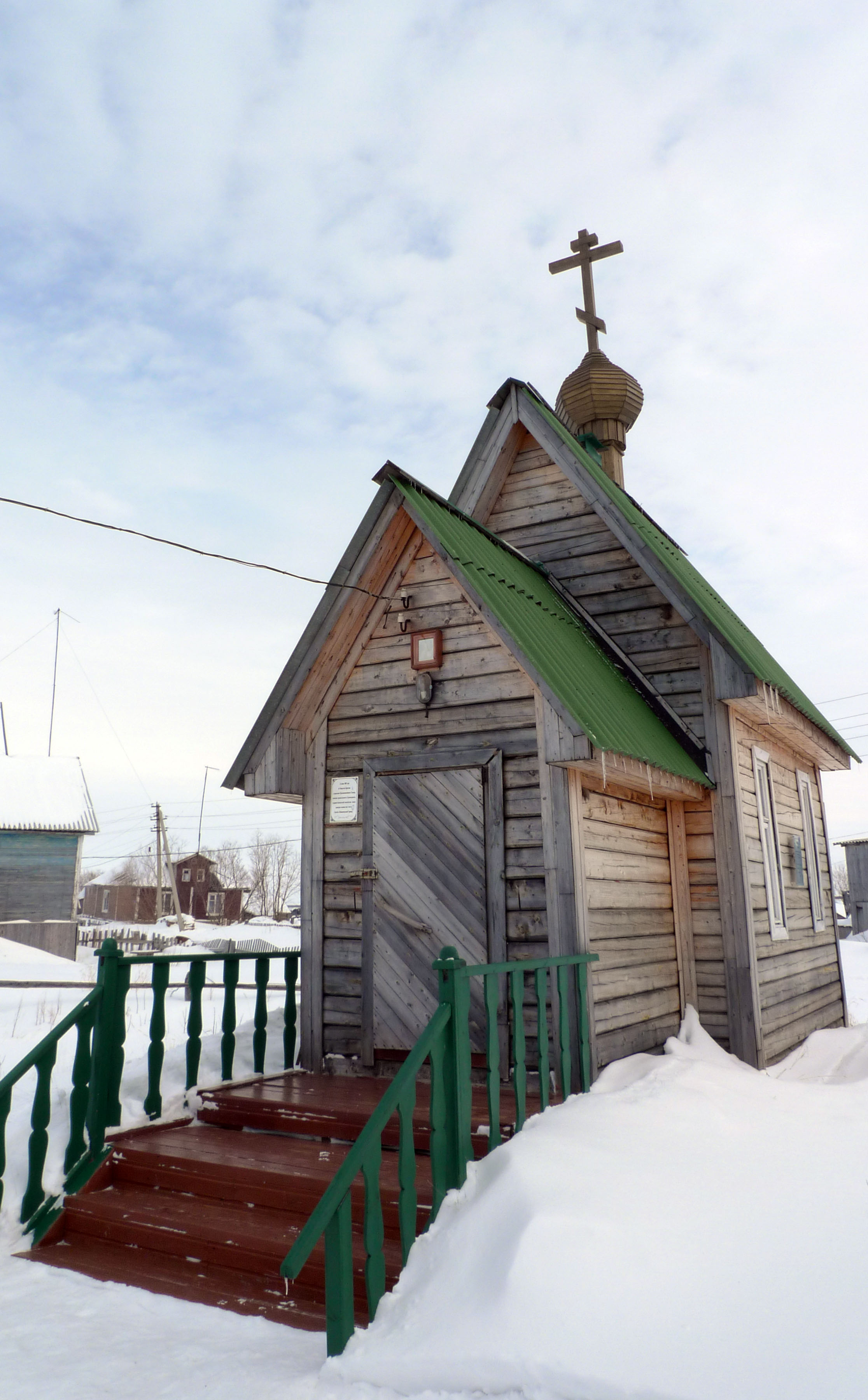 Свято-Никольская часовня села деревни Каратайка (Нарьян-Марская епархия)